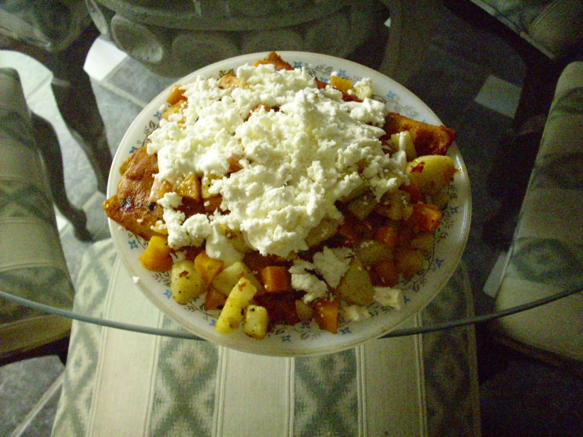 Echiladas Morelianas, tortilla de maiz cubierta por una salsa de chile Guajillo